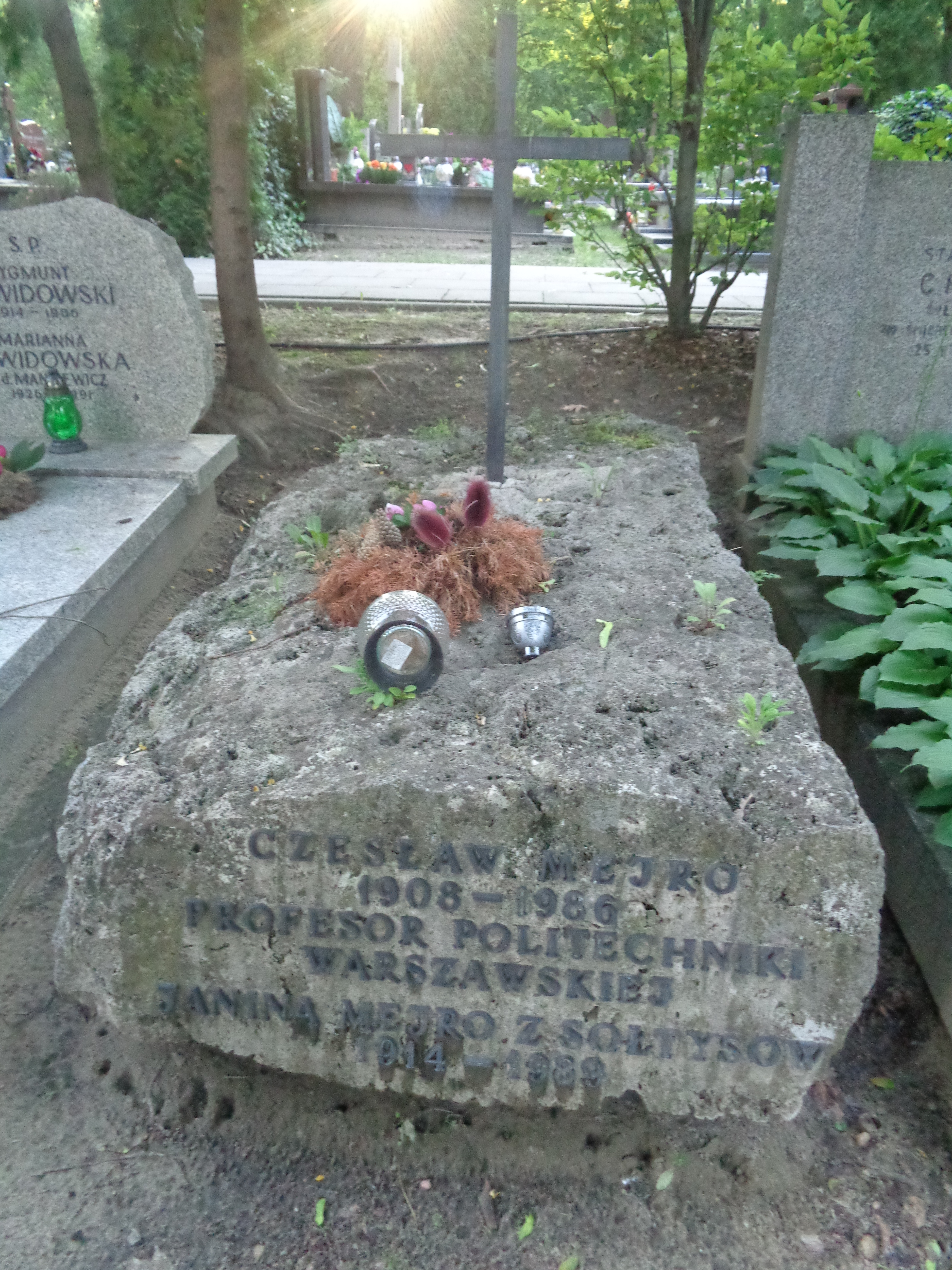 Grób Czesława Mejro na Cmentarzu Wojskowym na Powązkach